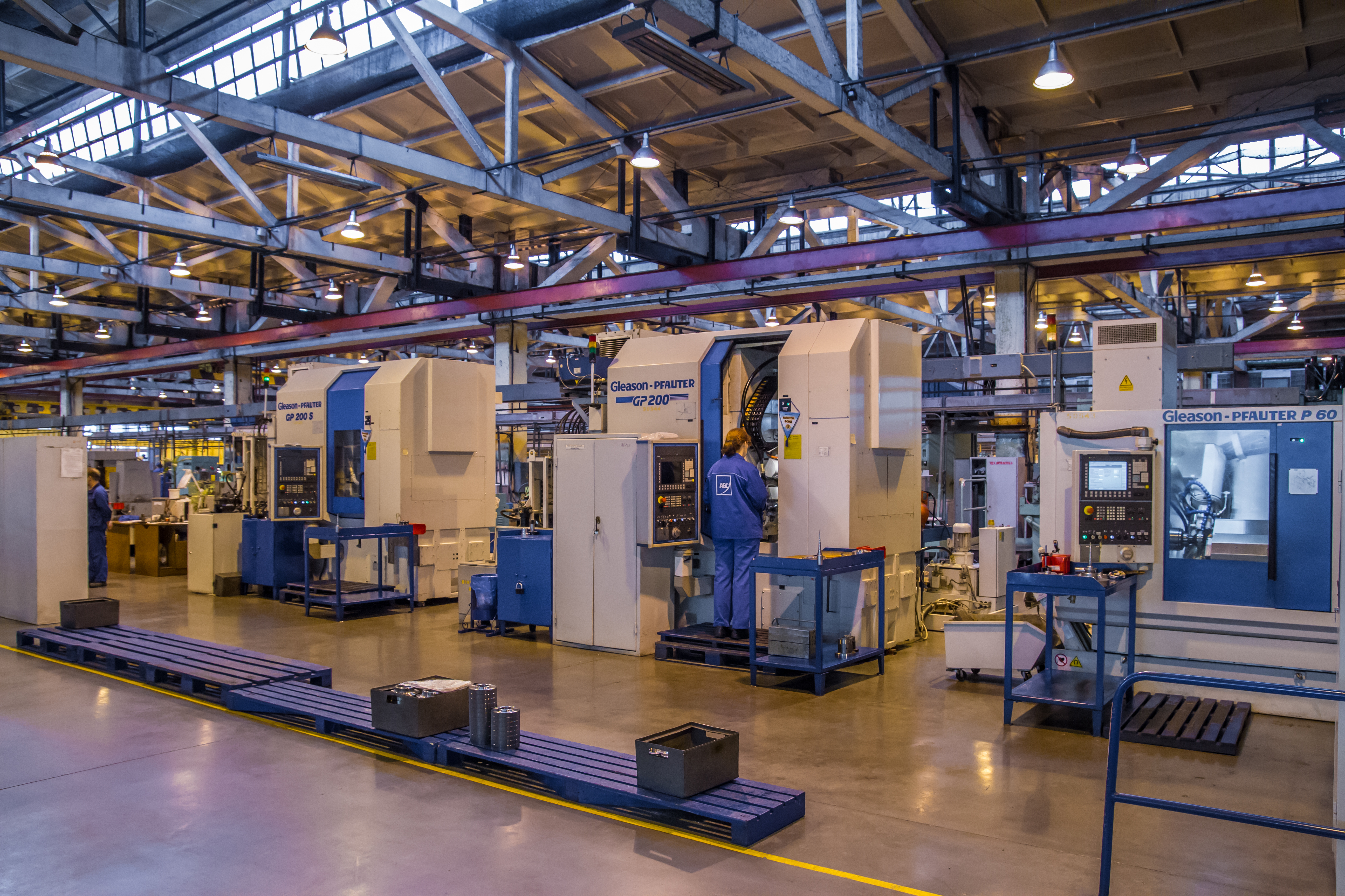 Механосборочный цех ОАО «АБС ЗЭиМ Автоматизация», Чебоксары. Оборудование Gleason-Pfauter Maschinenfabrik GmbH (Людвигсбург)